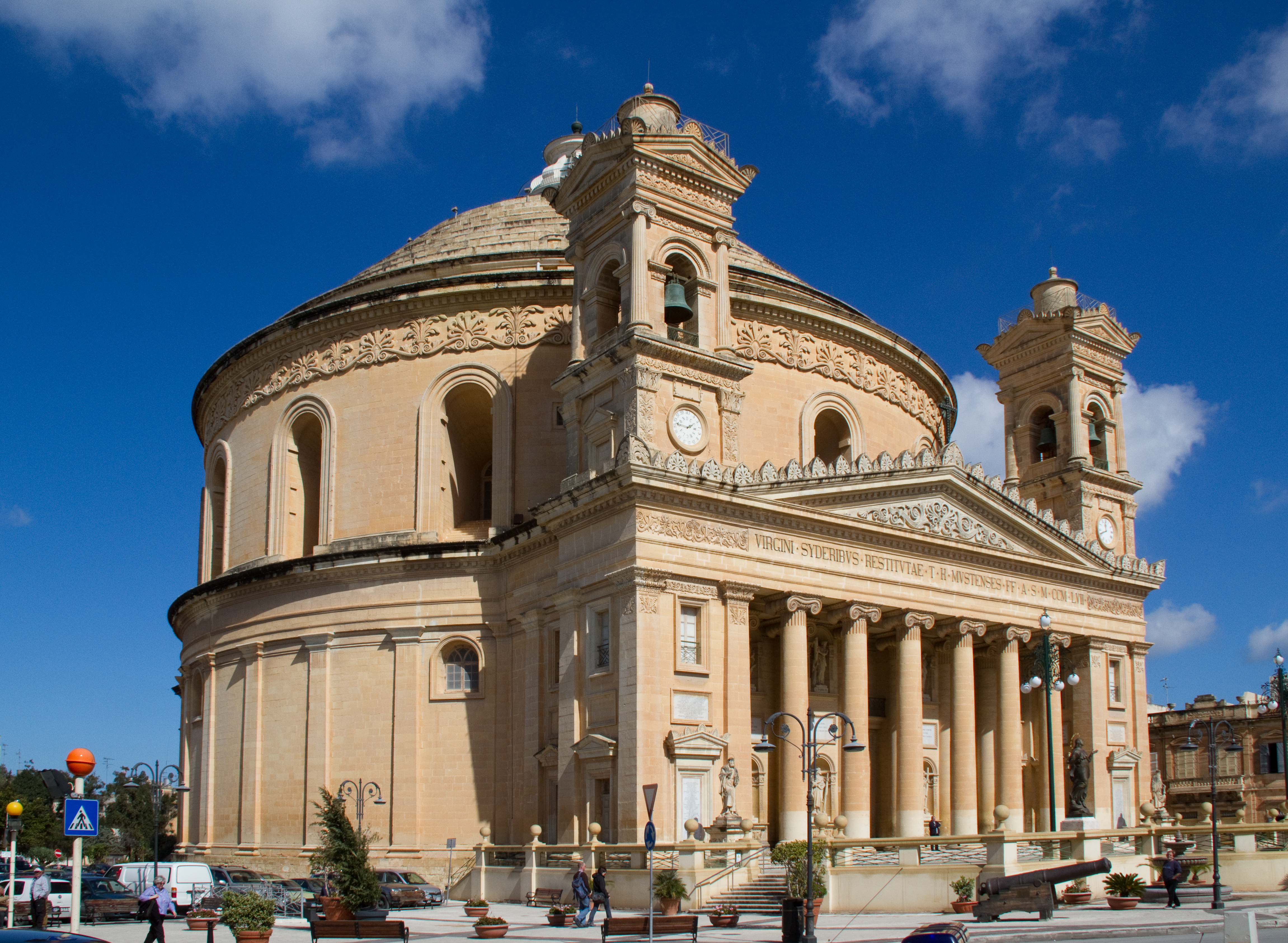 Mosta Dome 1